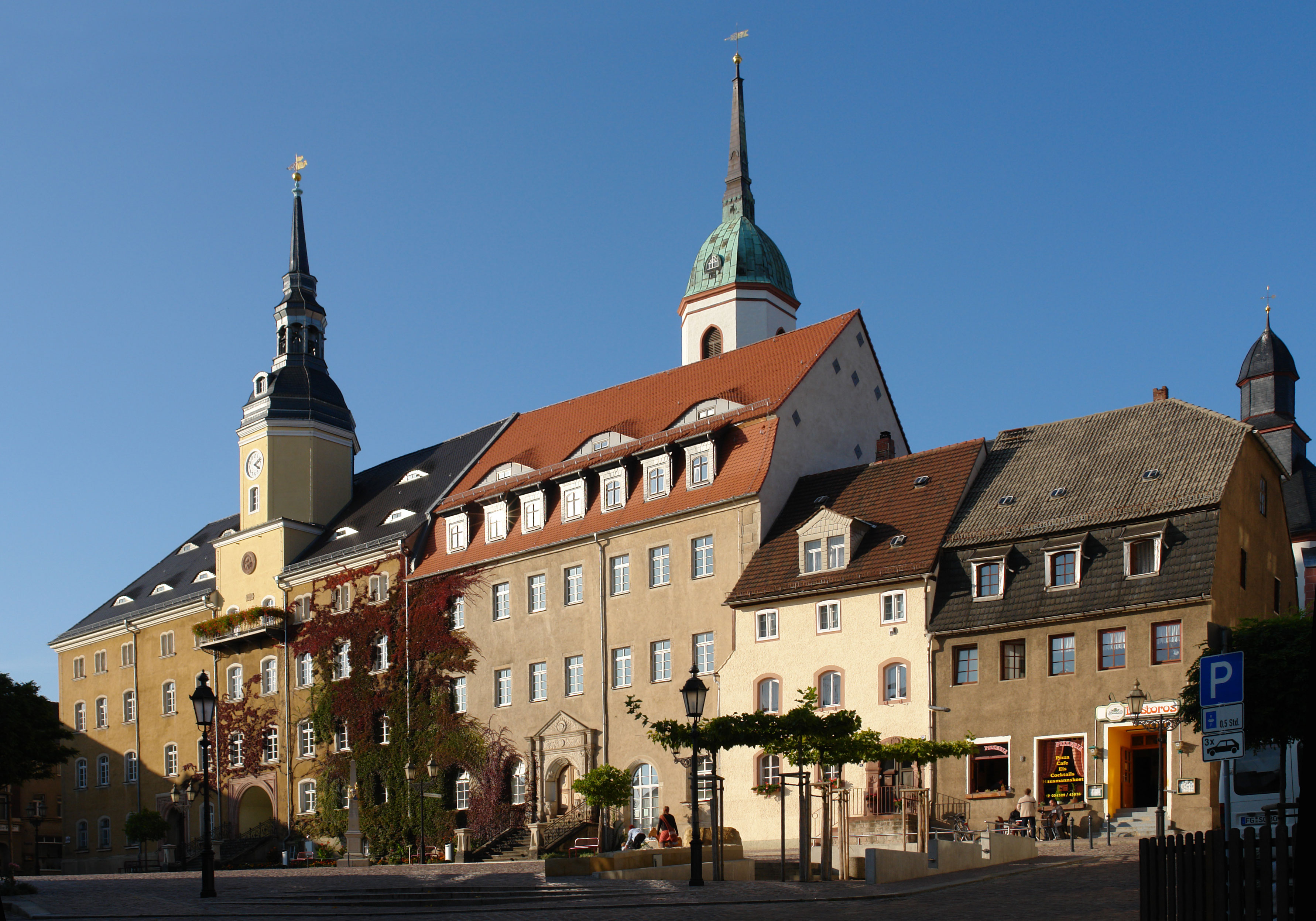 Marktplatz von Roßwein